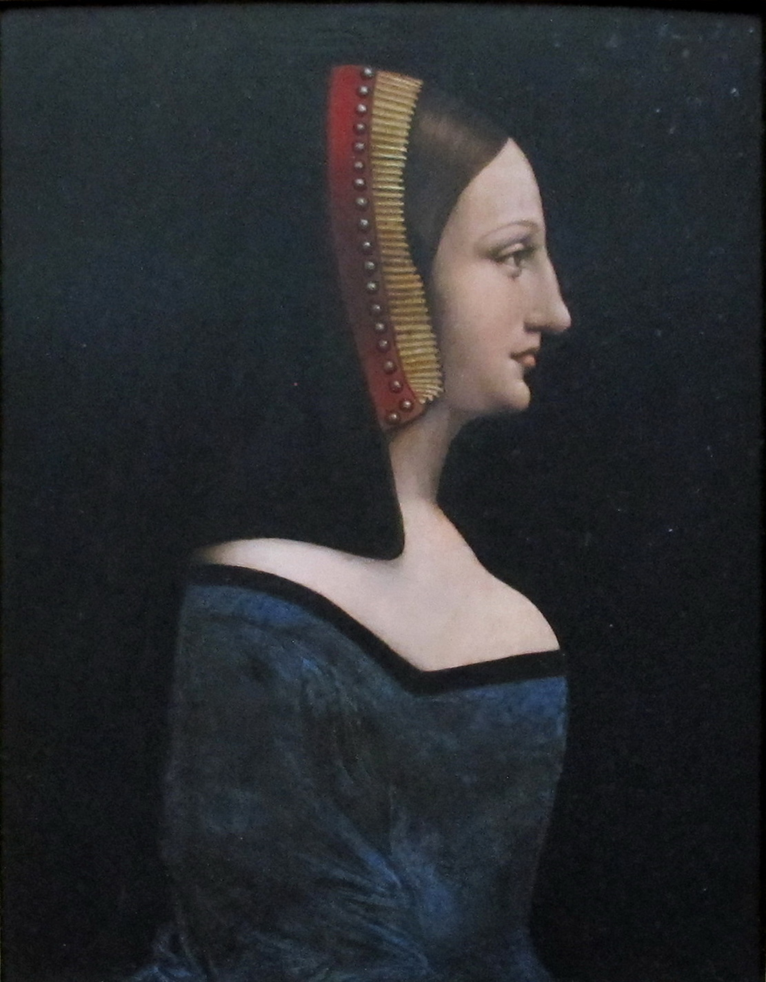 Pittura italiana del Cinquecento, Louvre